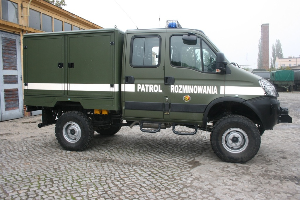 Pojazd Saperski TOPLA S AMZ-Kutno